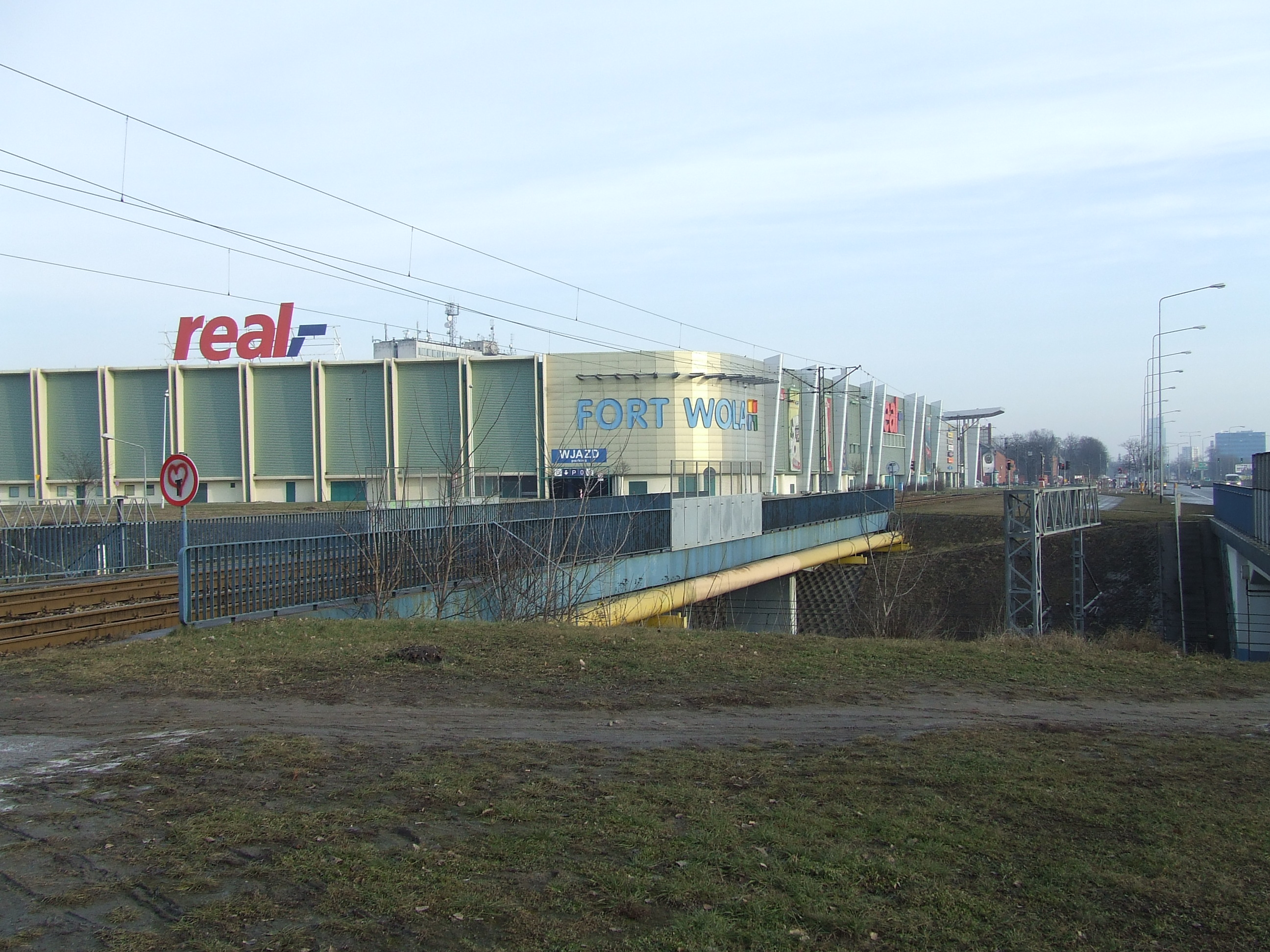 Fort W Twierdzy Warszawa, Warsaw